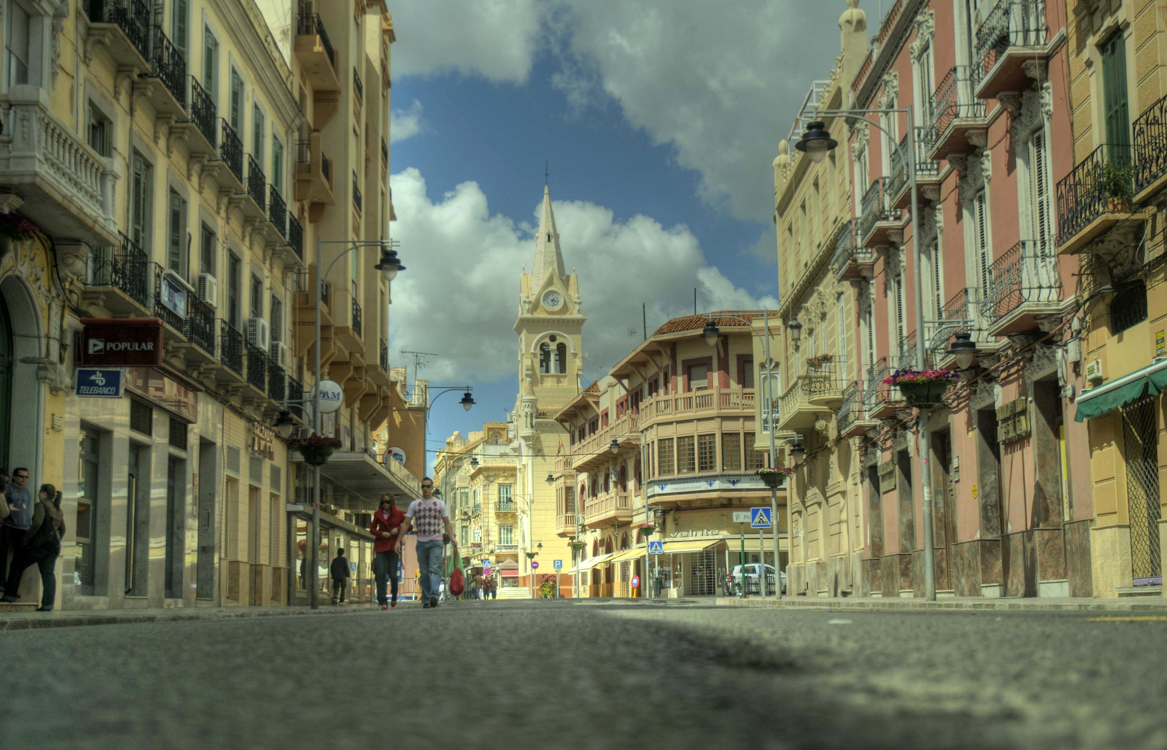 Semana Santa